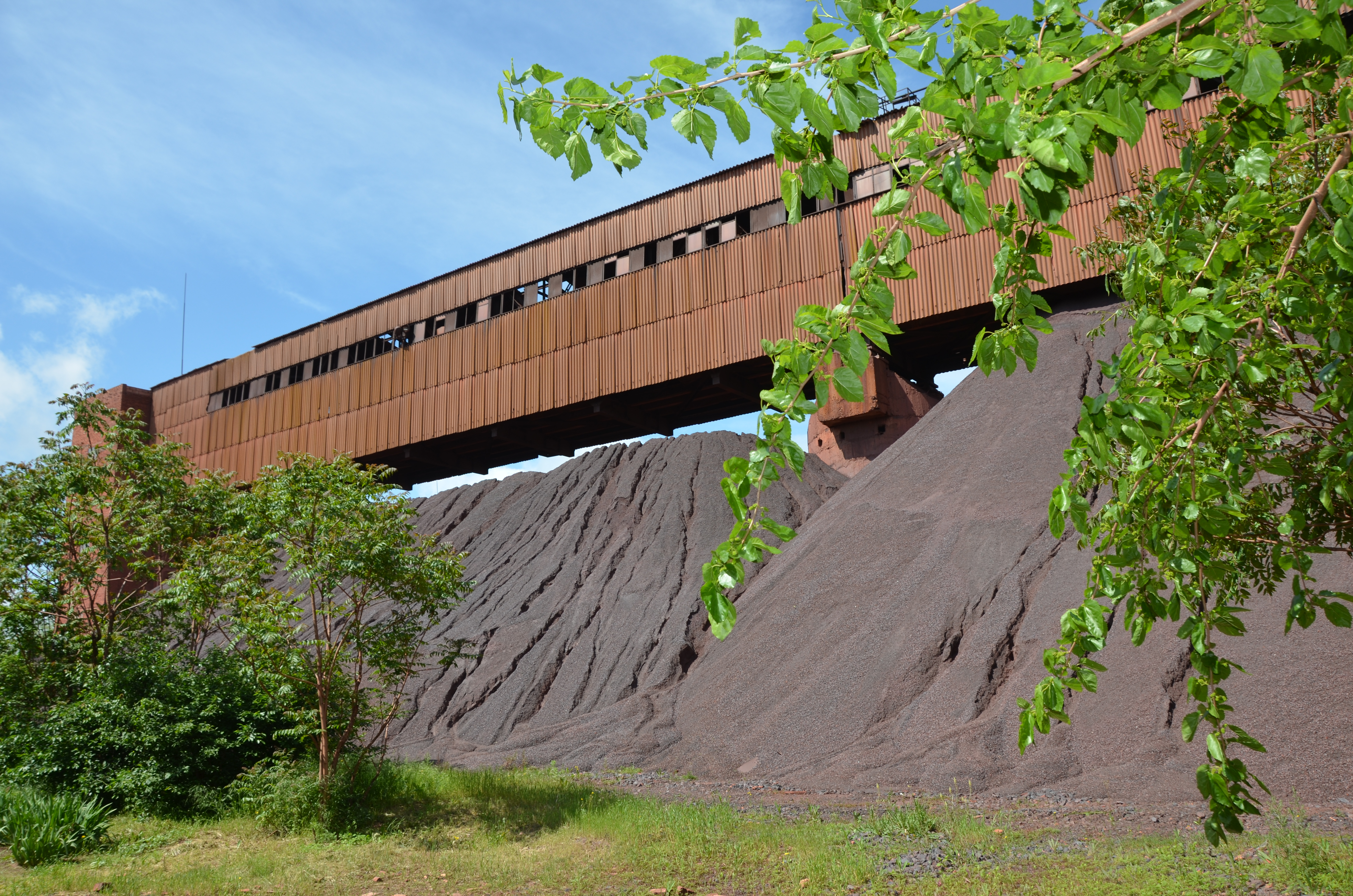 Склад руды